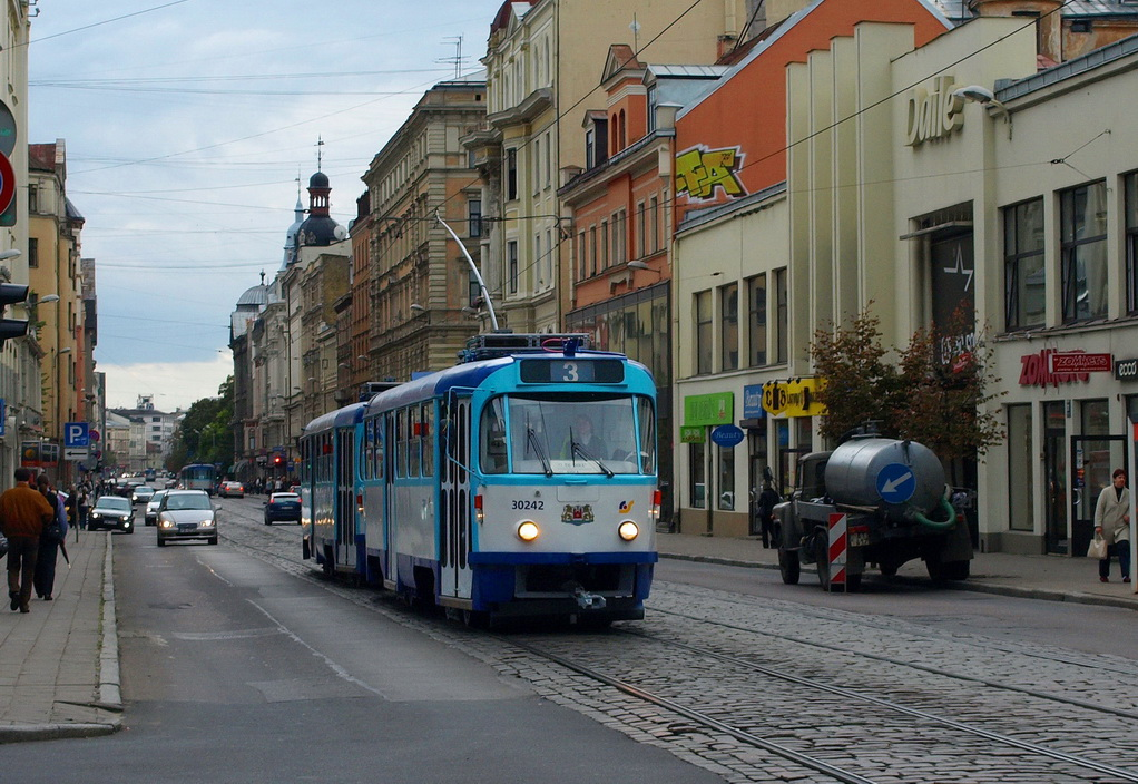 Centrs, Centra rajons, Rīga, Latvia